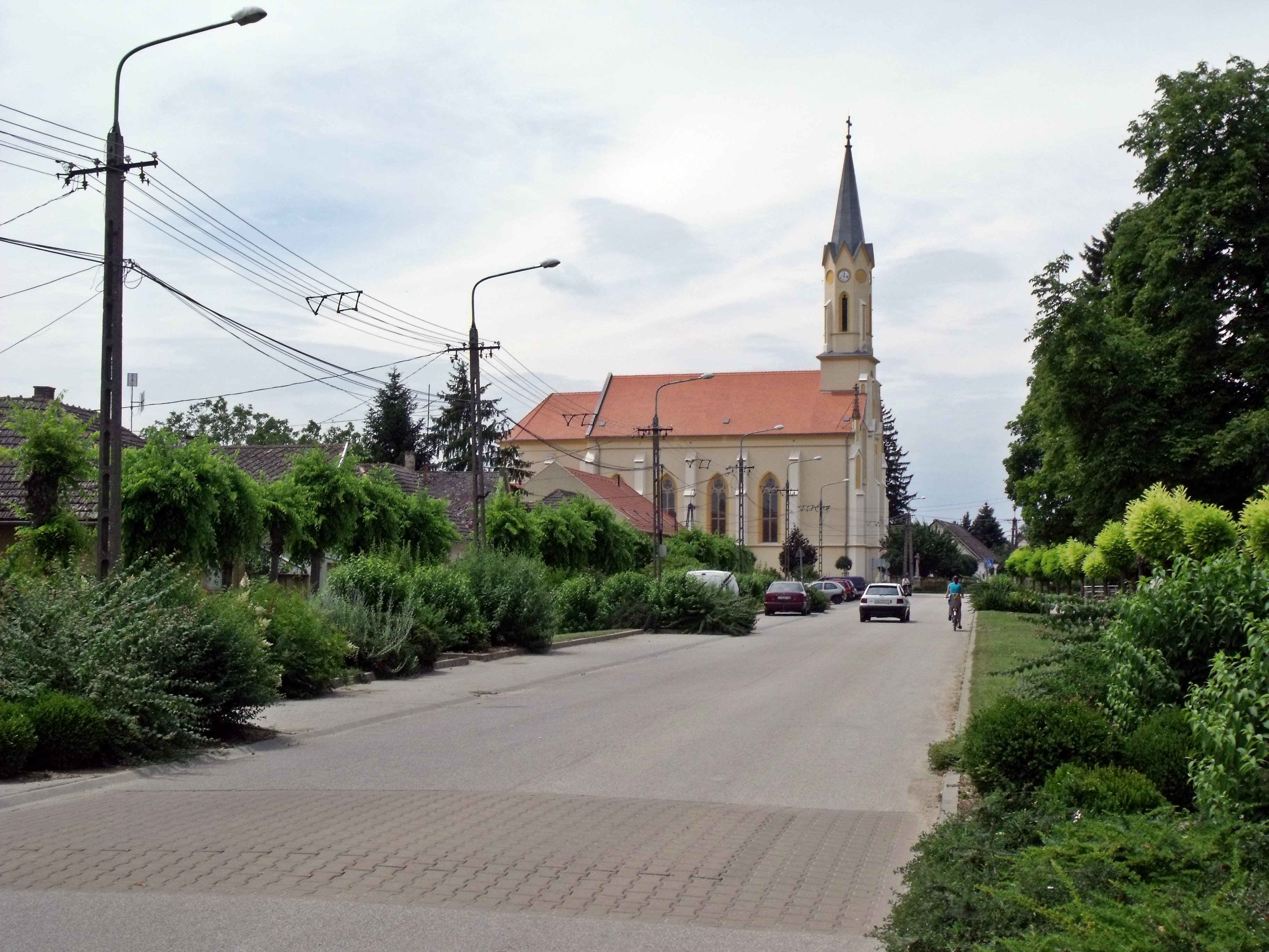 A faddi katolikus templom